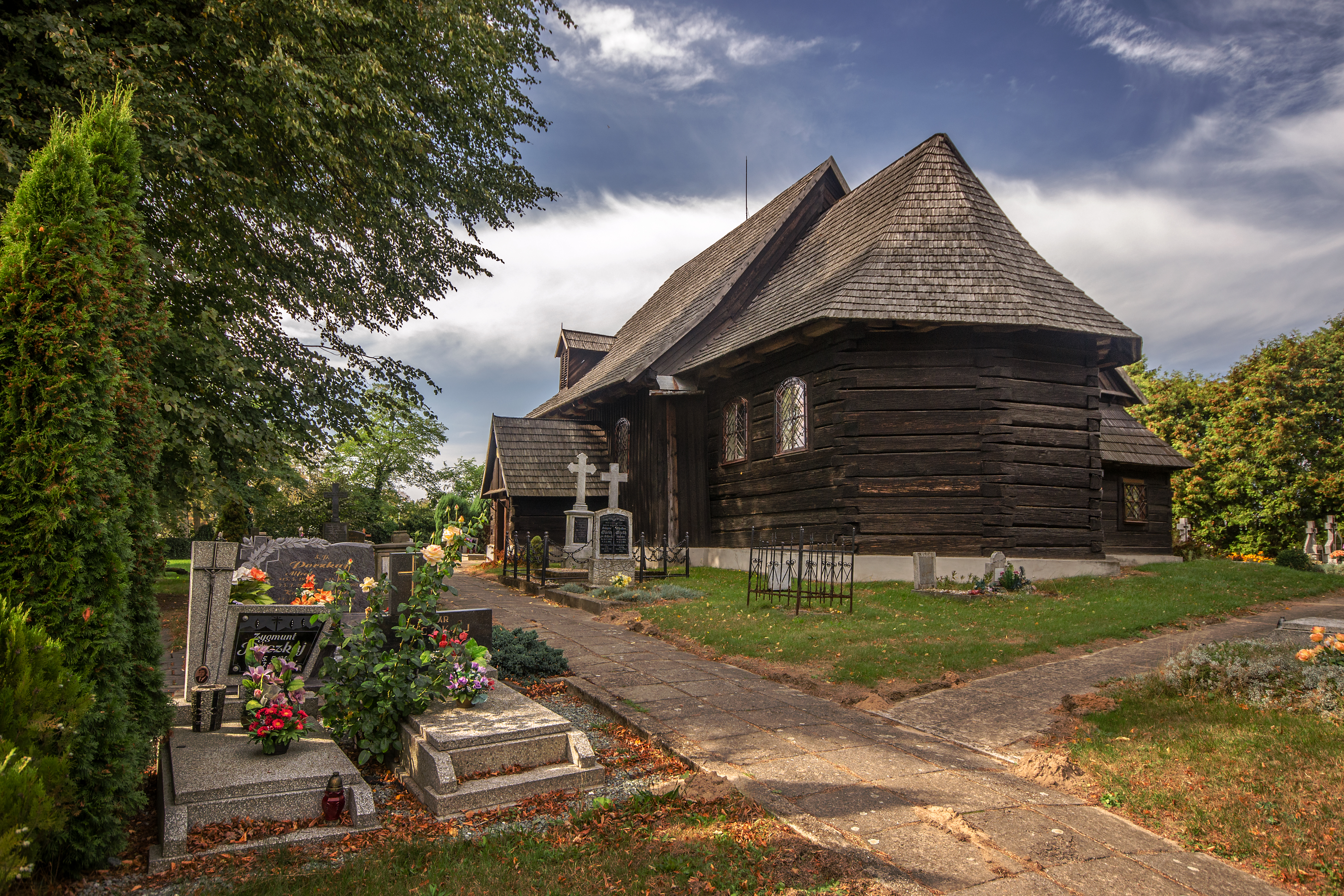 Maciejów, kościół ewangelicki, XVI/XVII